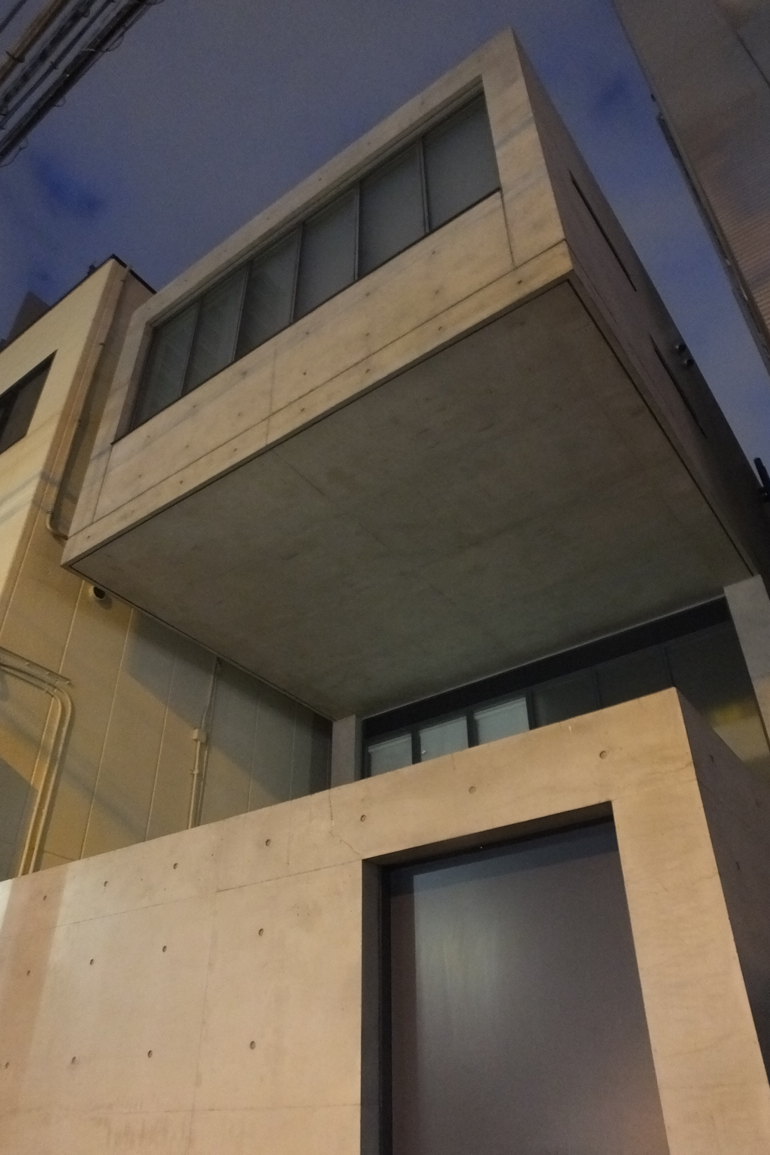 2019-08-06 Utsubo-koen-no-jutaku,Tadao Ando (靱公園の住宅,安藤忠雄)